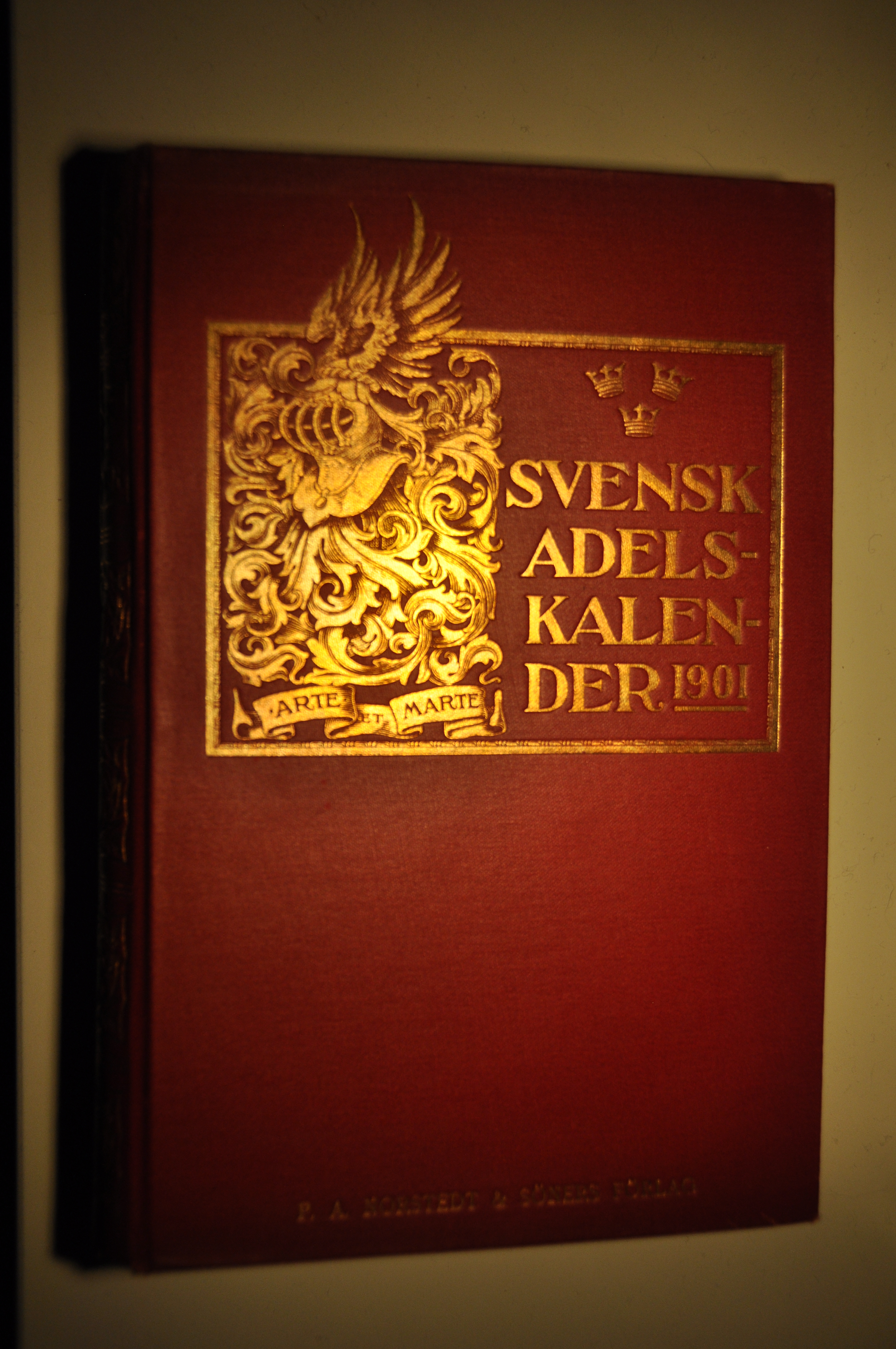 Svensk adelskalender var en adelskalender över svensk adel som gavs ut 1898–1910.